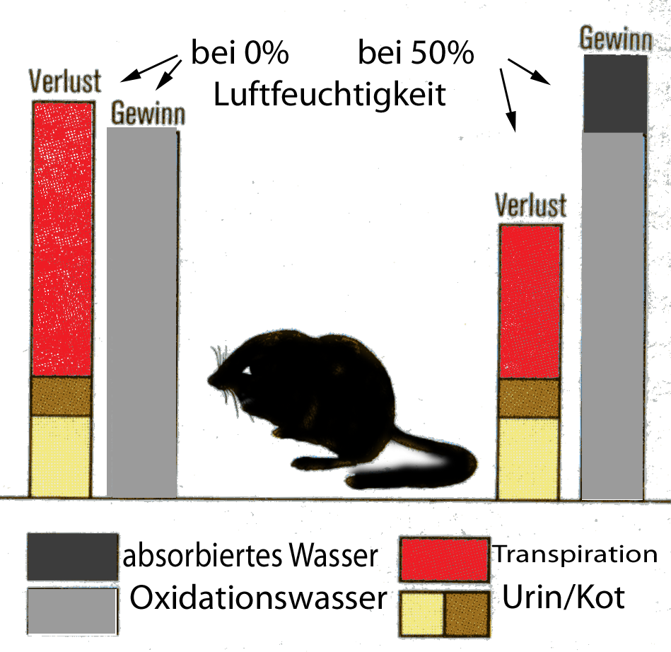 Schema der Wasserbilanz der Taschenspringmaus bei hoher und niedriger Luftfeuchte